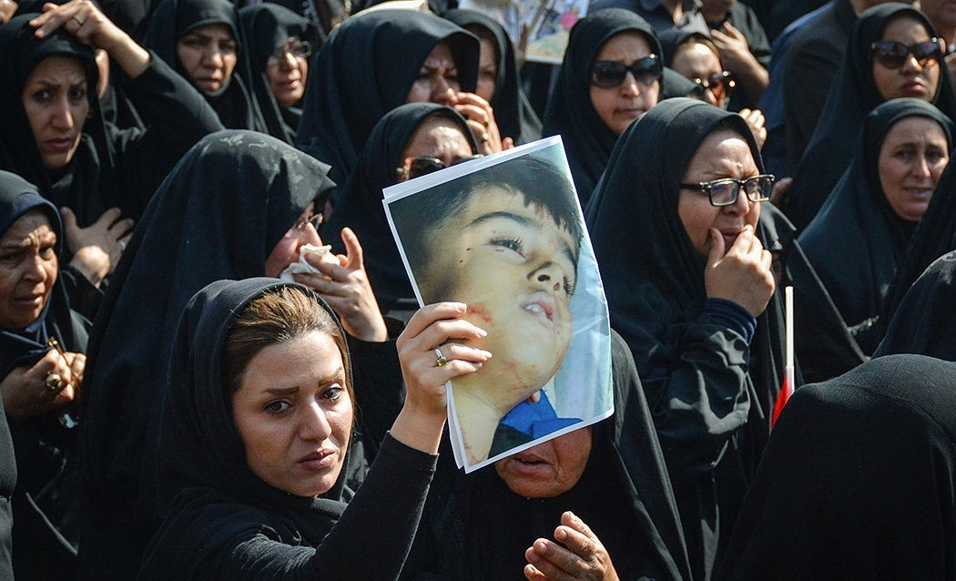 مراسم تشییع شهدای حمله تروریستی اهواز، امروزدوشنبه ۲ مهر ۱۳۹۷ از حسینیه ثارالله اهواز به سمت چهارراه زند و گلزار شهدای بهشت آباد برگزار شد.در این مراسم که ساعت 8:30 دقیقه صبح آغازشد، اقشار مختلف مردم ولایتمدار و شهیدپرور خوزستان با آرمان‌های شهدا و انقلاب اسلامی تجدید میثاق کردند. در حمله تروریستی روز گذشته که در حین رژه نیروهای مسلح در اهواز رخ داد، 24 نفر به شهادت رسیده و 59 نفر مجروح شدند.